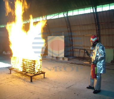 badanie spalania